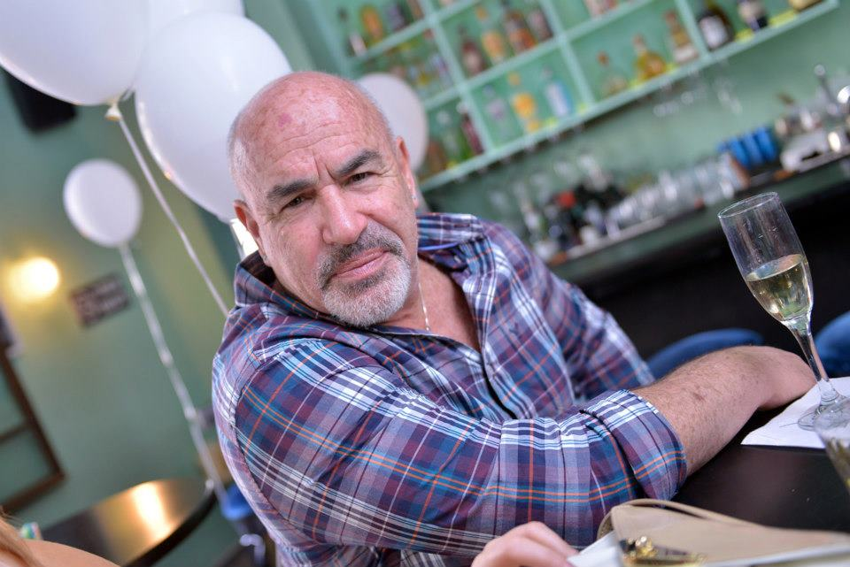 אורי ברגמן שחיין פאראלימפי בעבר ומאמן שחייה כדורמים. דוקטור בפסיכולוגיה שיקומית ועבודה סוציאלית.